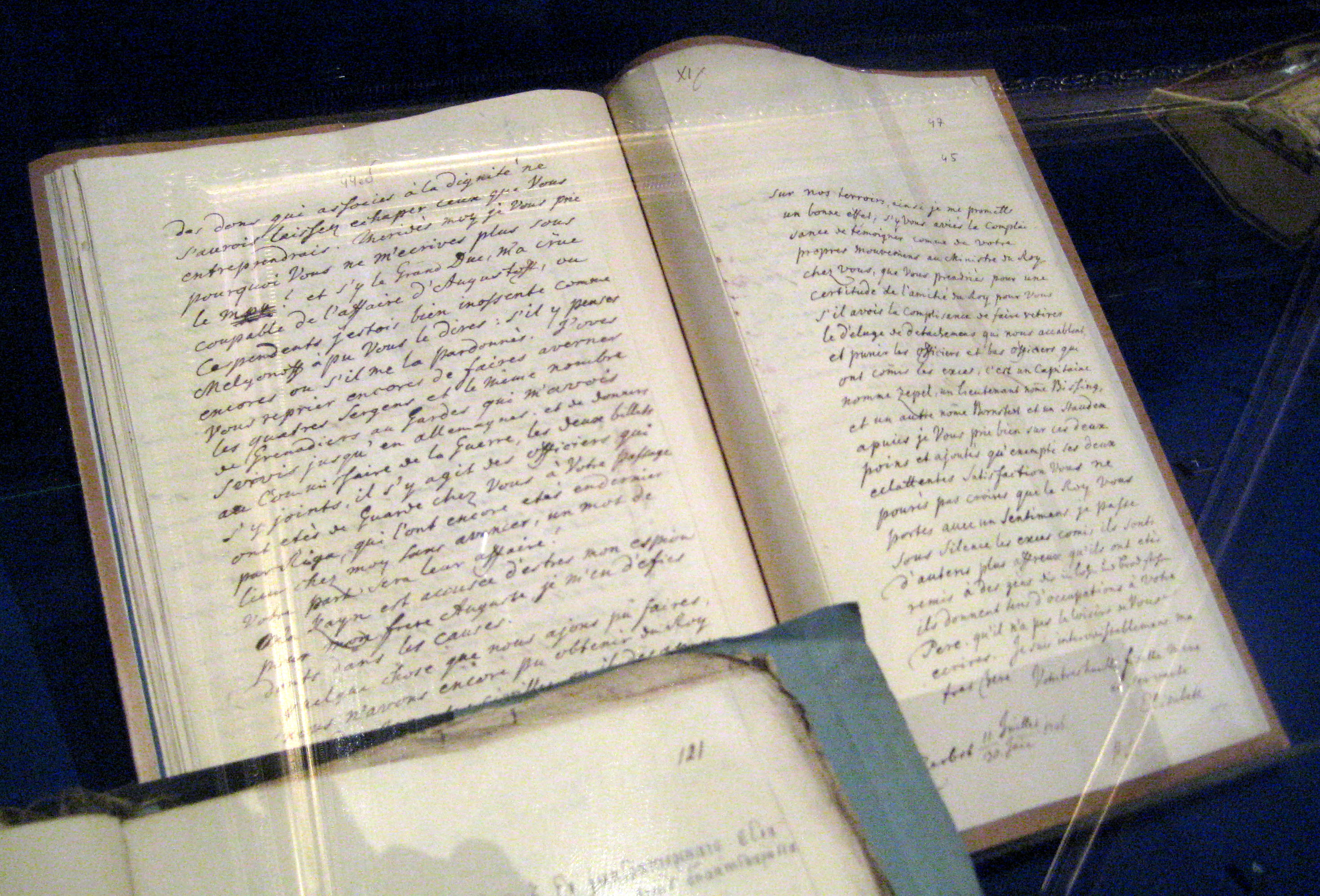 Письмо принцессы Иоганны Елизаветы Ангальт-Цербстской к дочери. Цербст. 11 июля 1746 г. Часть тайной переписки. Автограф. РГАДА